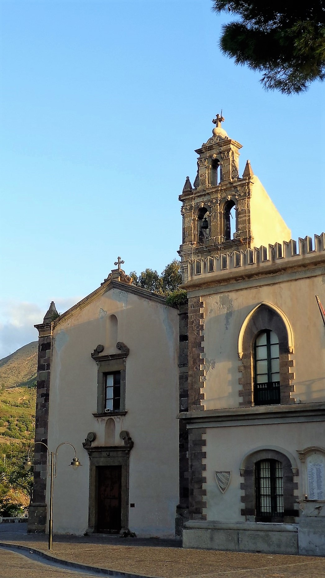 Prospetto chiesa e convento di Sant'Antonino.